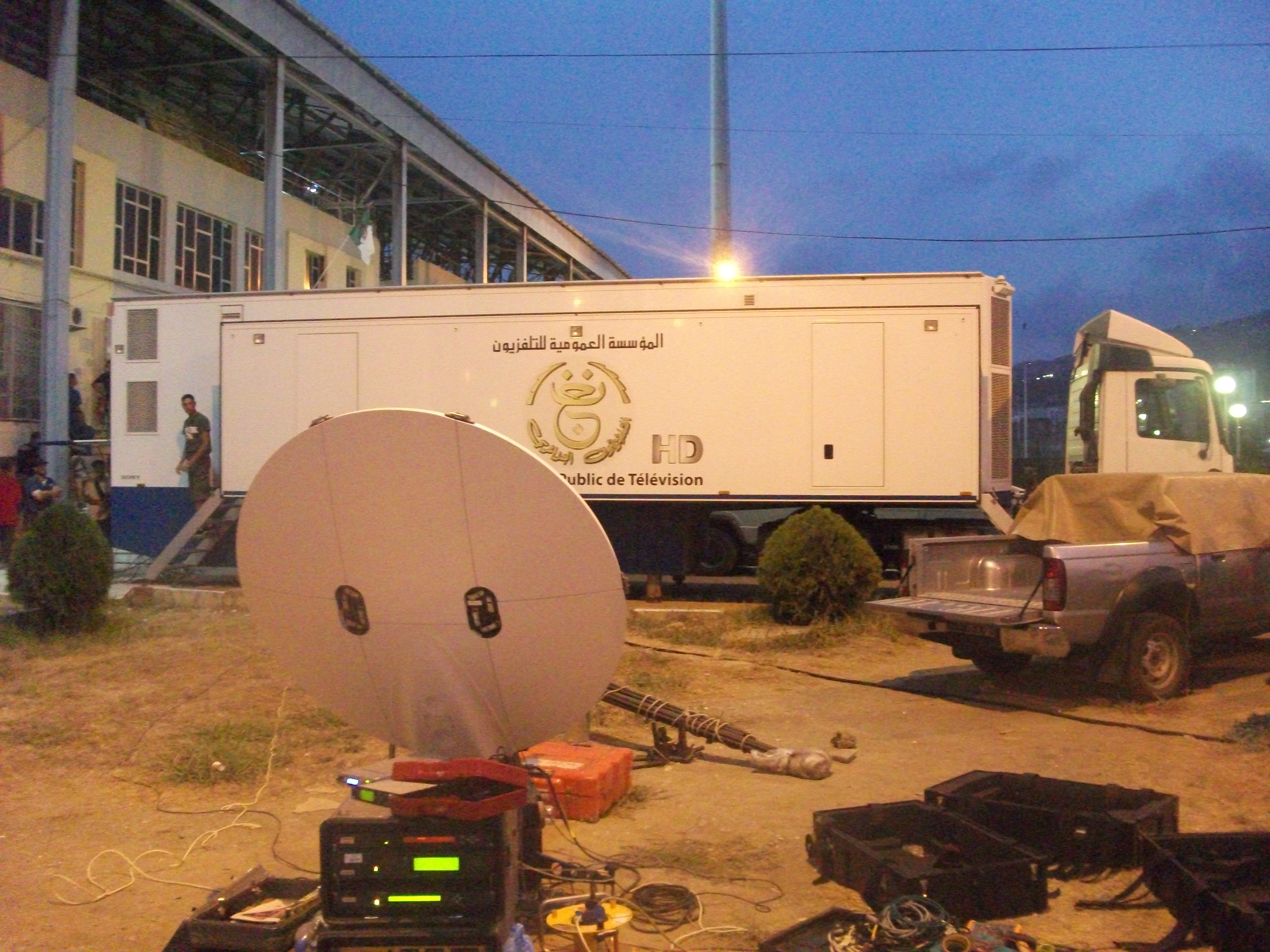 Car régie HD de l'EPT le 24 août 2013, lors du match JSMB-MCA